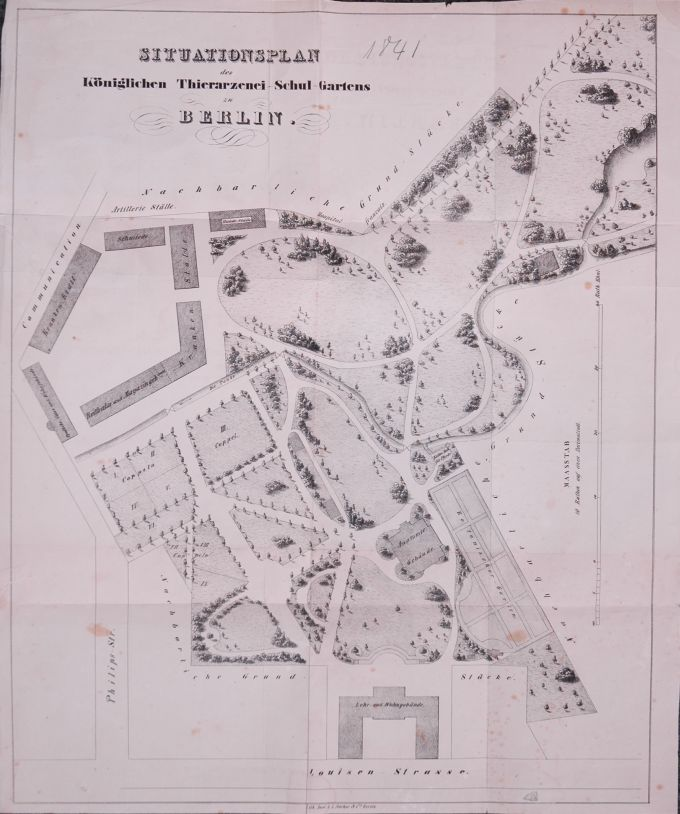 Situationsplan des Königl. Thierarzenei-Schul-Gartens in Berlin im Jahr 1841.